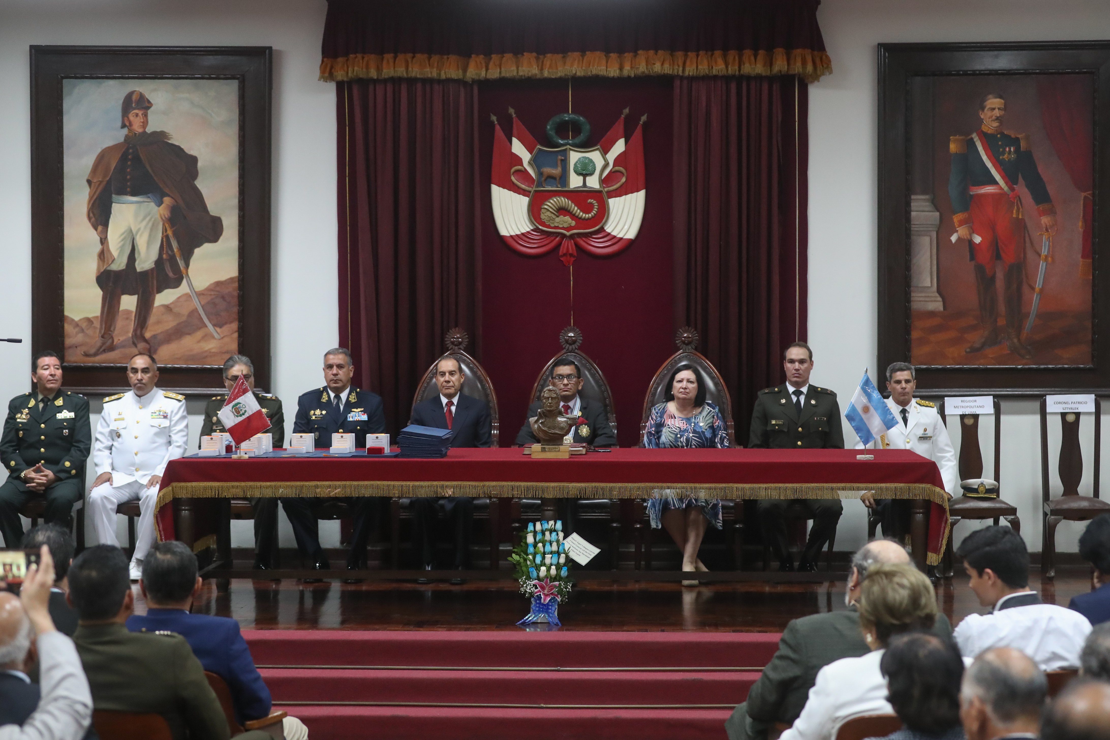 Ceremonia por 85 aniversario del Instituto Sanmartiniano del Perú